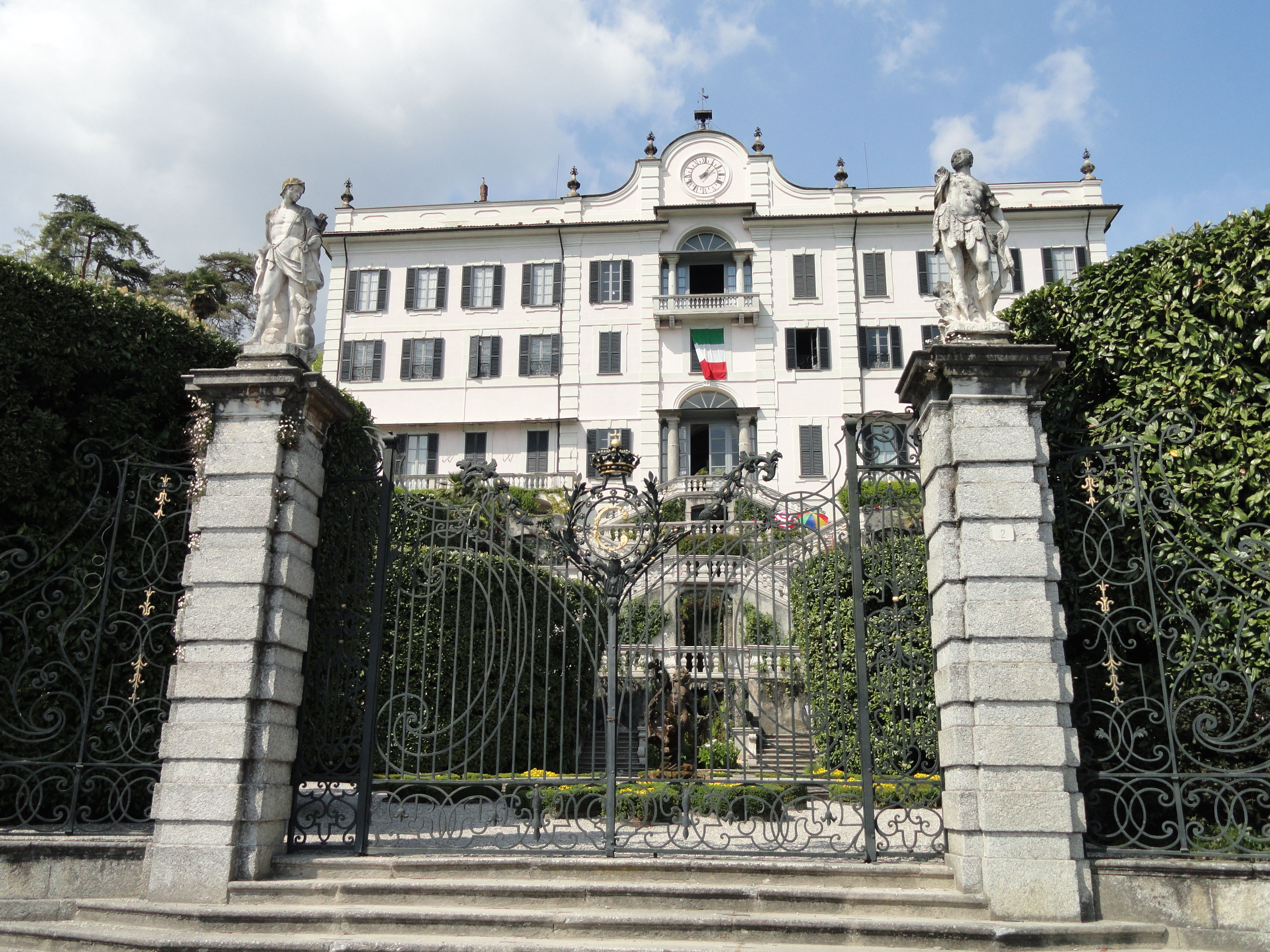 Villa Carlotta (Tremezzo), on Lake Como, Italy.